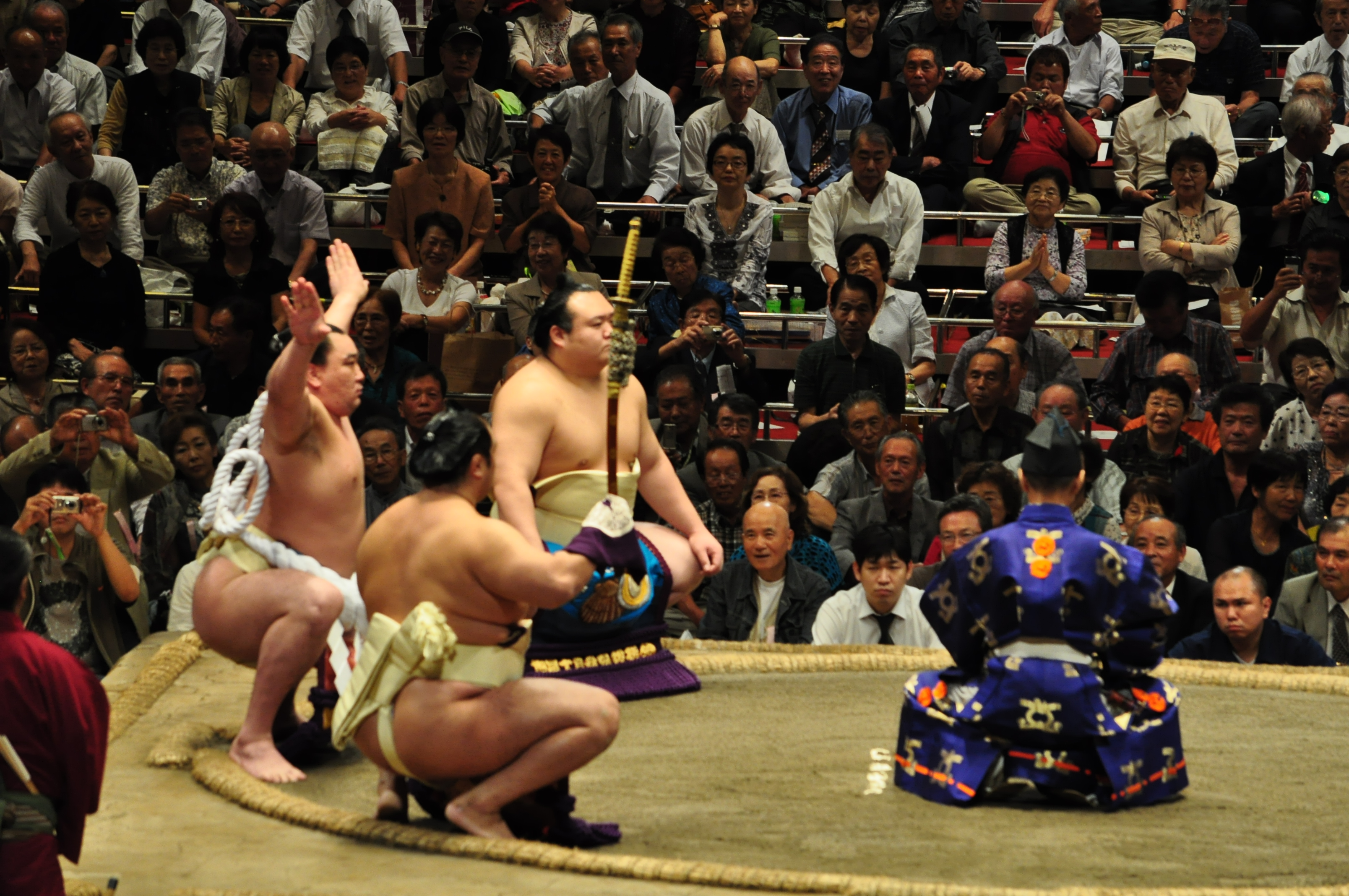 横綱日馬富士の土俵入り